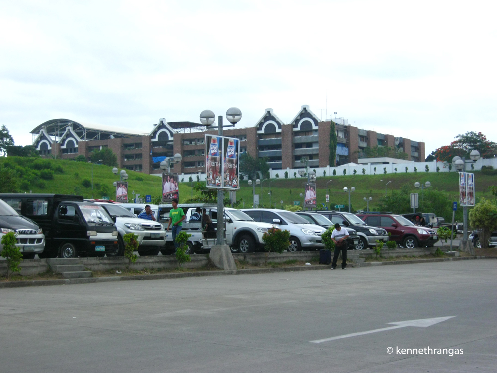 Jose Maria College